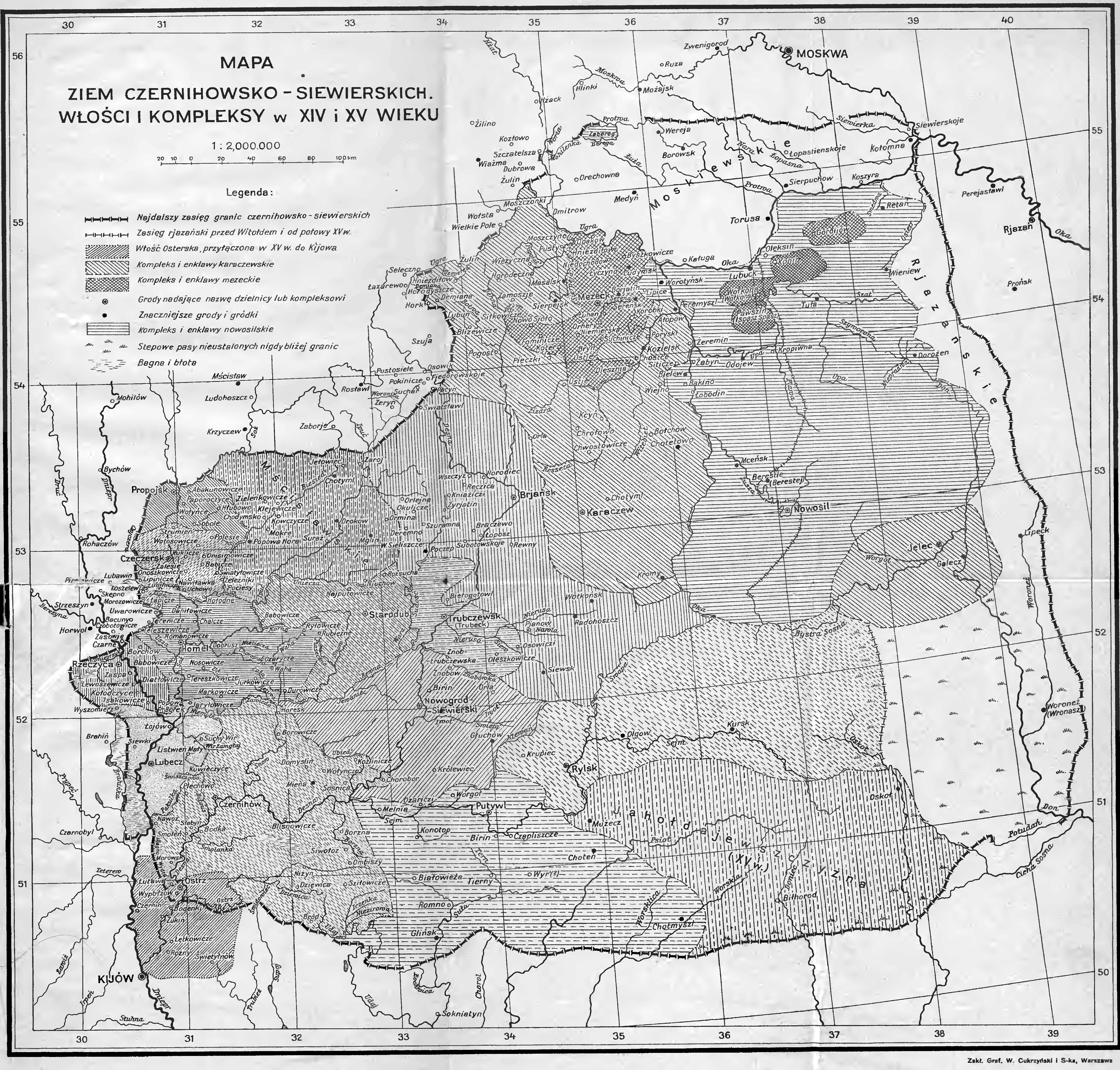 Mapa załączona do książki S. Kuczyńskiego «Ziemie Czernihowsko-Siewierskie pod rządami Litwy», wydanej w Warszawie w 1936 roku.